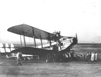 لحكومة الانجليزي تنشئ محطة مطار دارين الجوية وبذلك تربط المحطة الفارسية ببوشهر بدارين عام 1930م